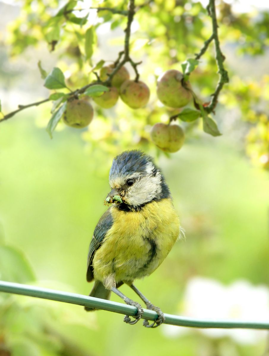 Amilotx urdina